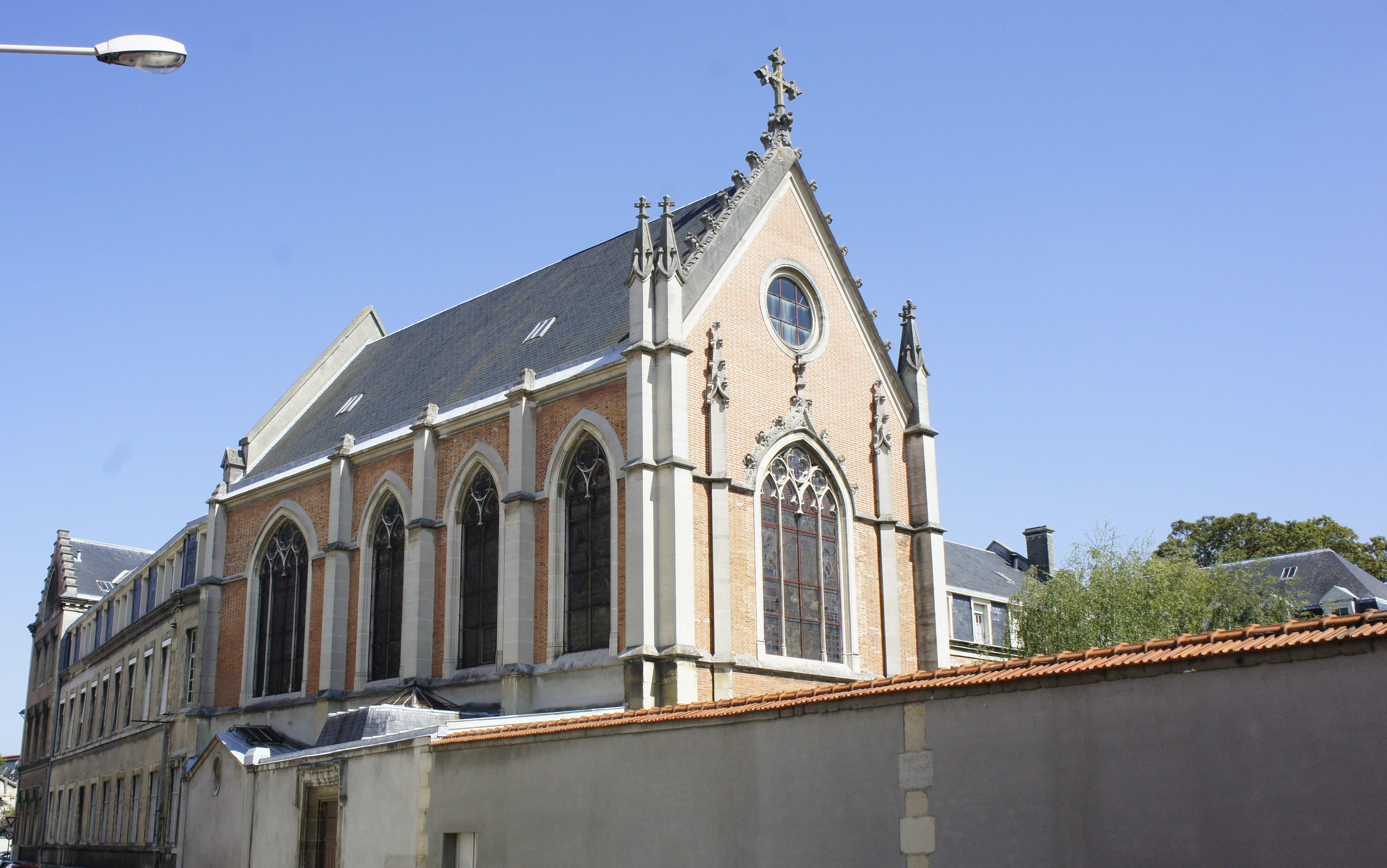 vue de l'extérieur de la Chapelle des soeurs de l'enfant Jésus par la rue des Orphelins, Reims.